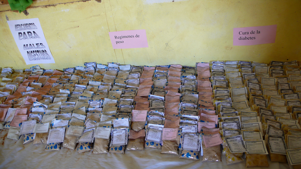 Incluye regimenes de peso (para engordar).